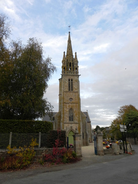 Pouldouran. Iliz. Tour